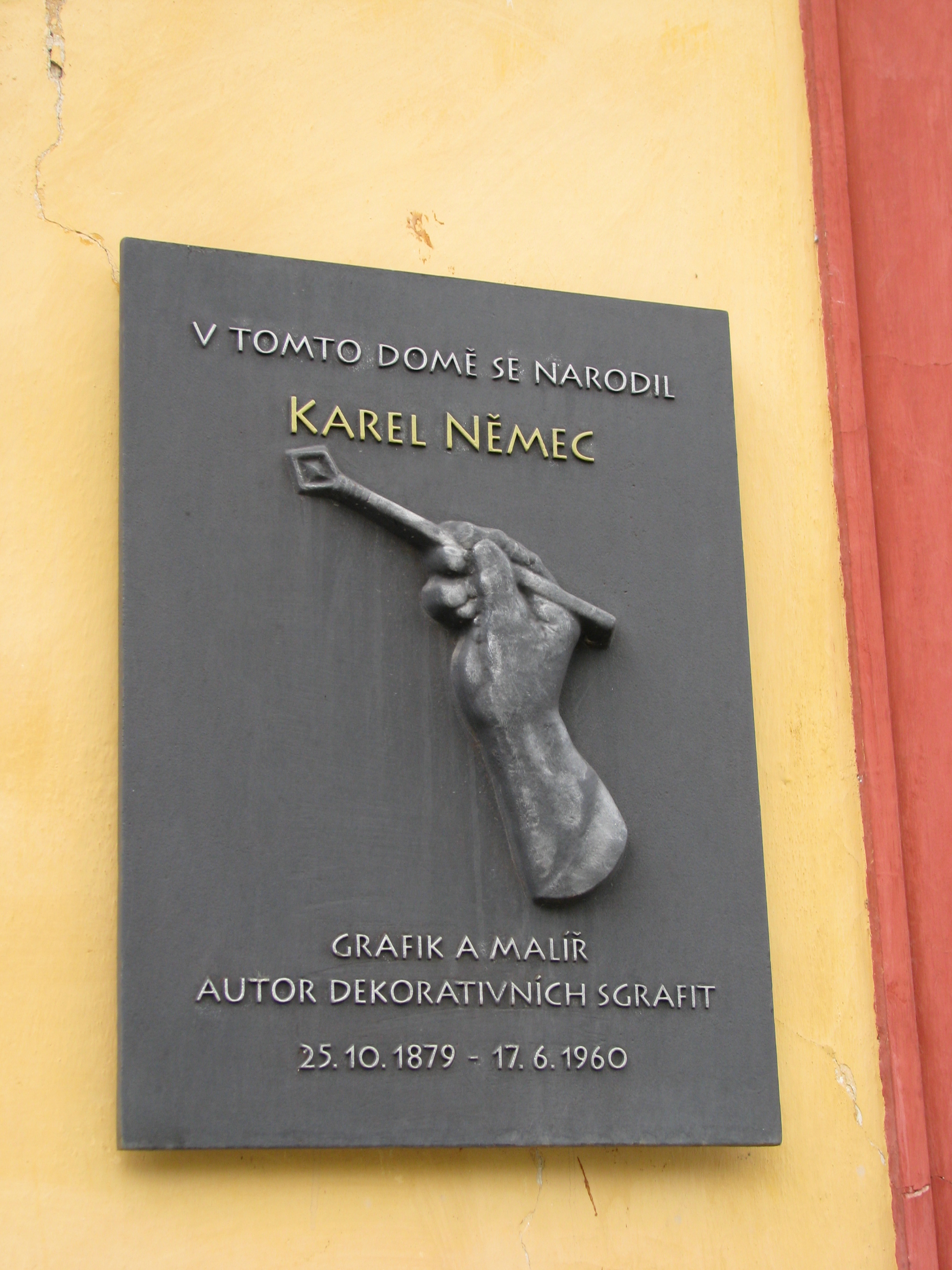 Městský dům, Žďárská č.p. 40, Nové Město na Moravě